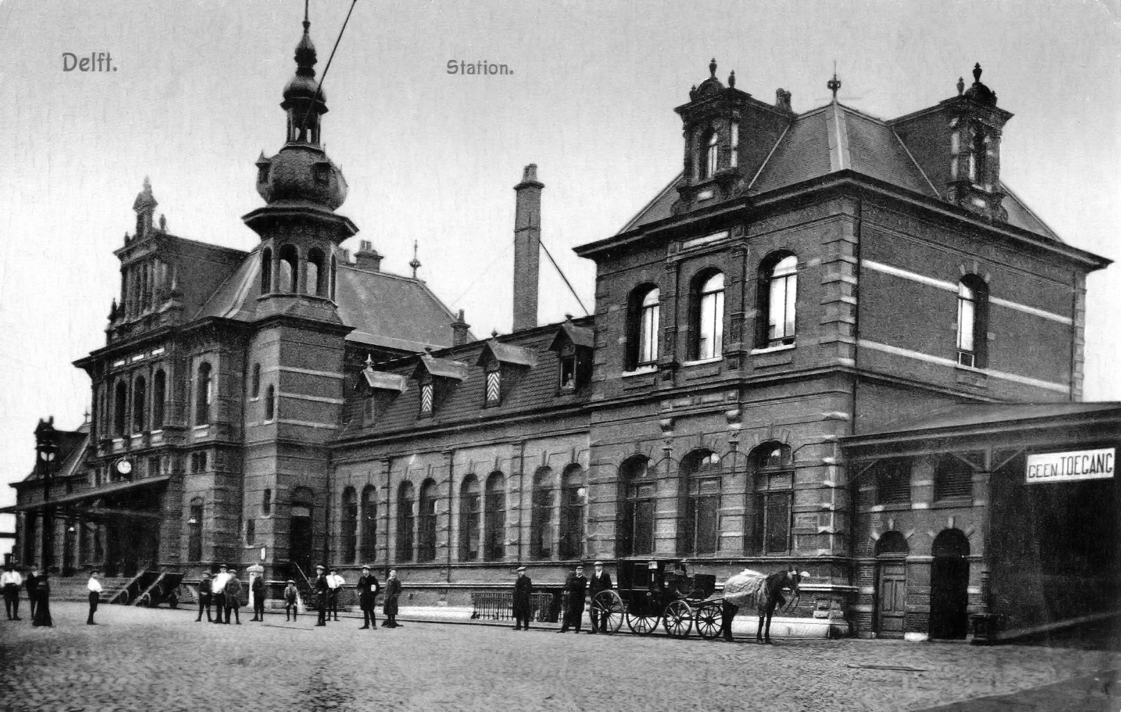 Station Delft; circa 1905. Collectie van het Utrechts Archief.